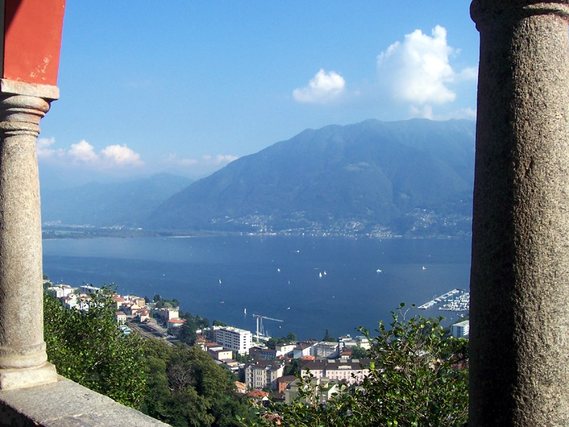 Panorama di Locarno dalla Madonna del Sasso